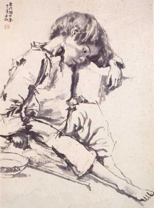 中文（中国大陆）: 由四川画家蒋兆和所绘。